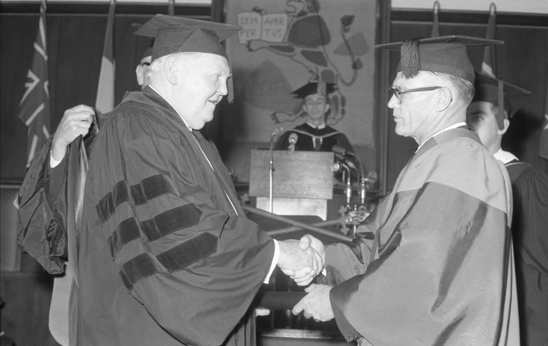 Ehrendoktorwürde der Maryland-Universität in Heidelberg an Bundeskanzler Prof. Erhard